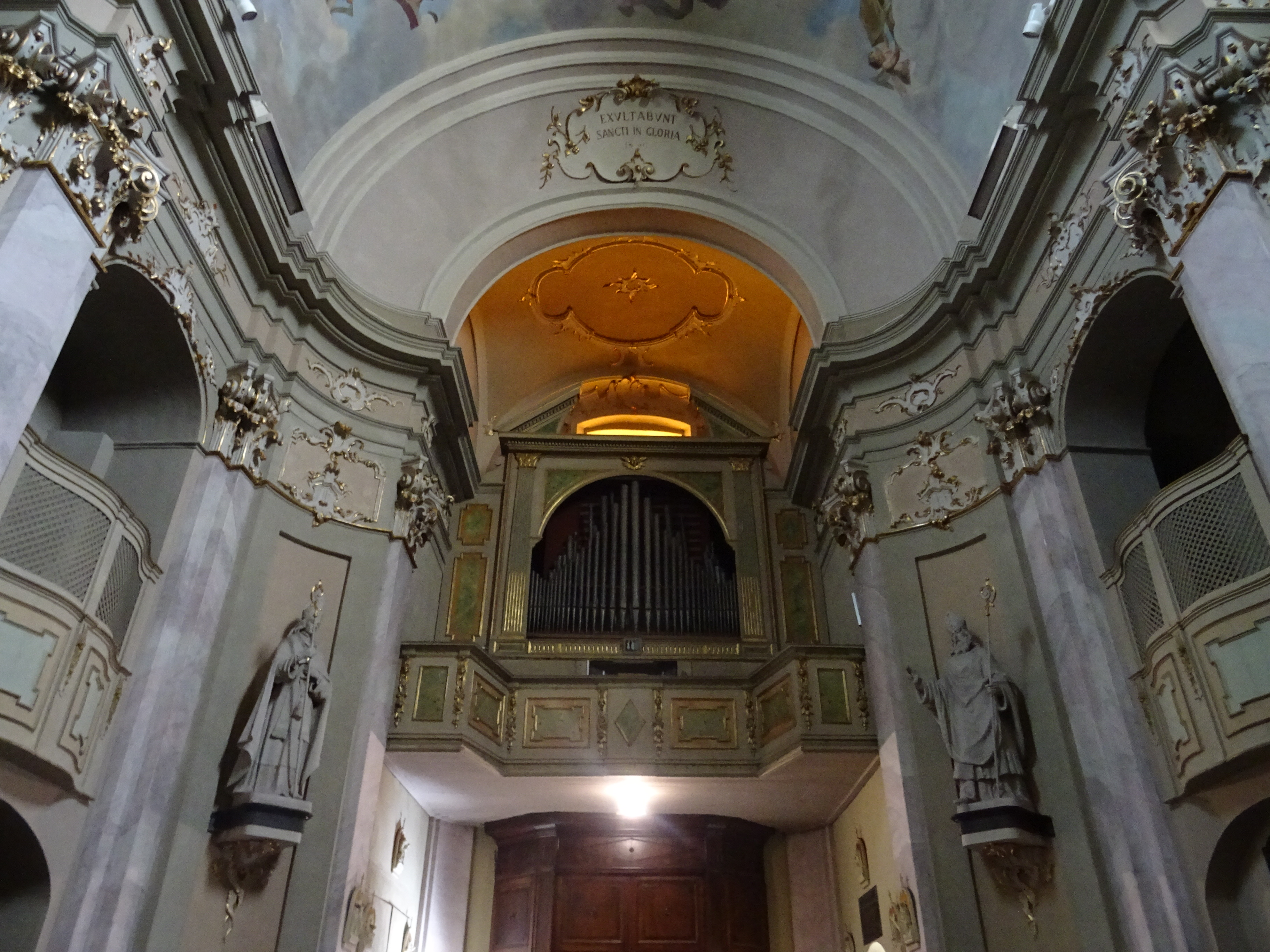 Santuario di San Vincenzo a Cernobbio